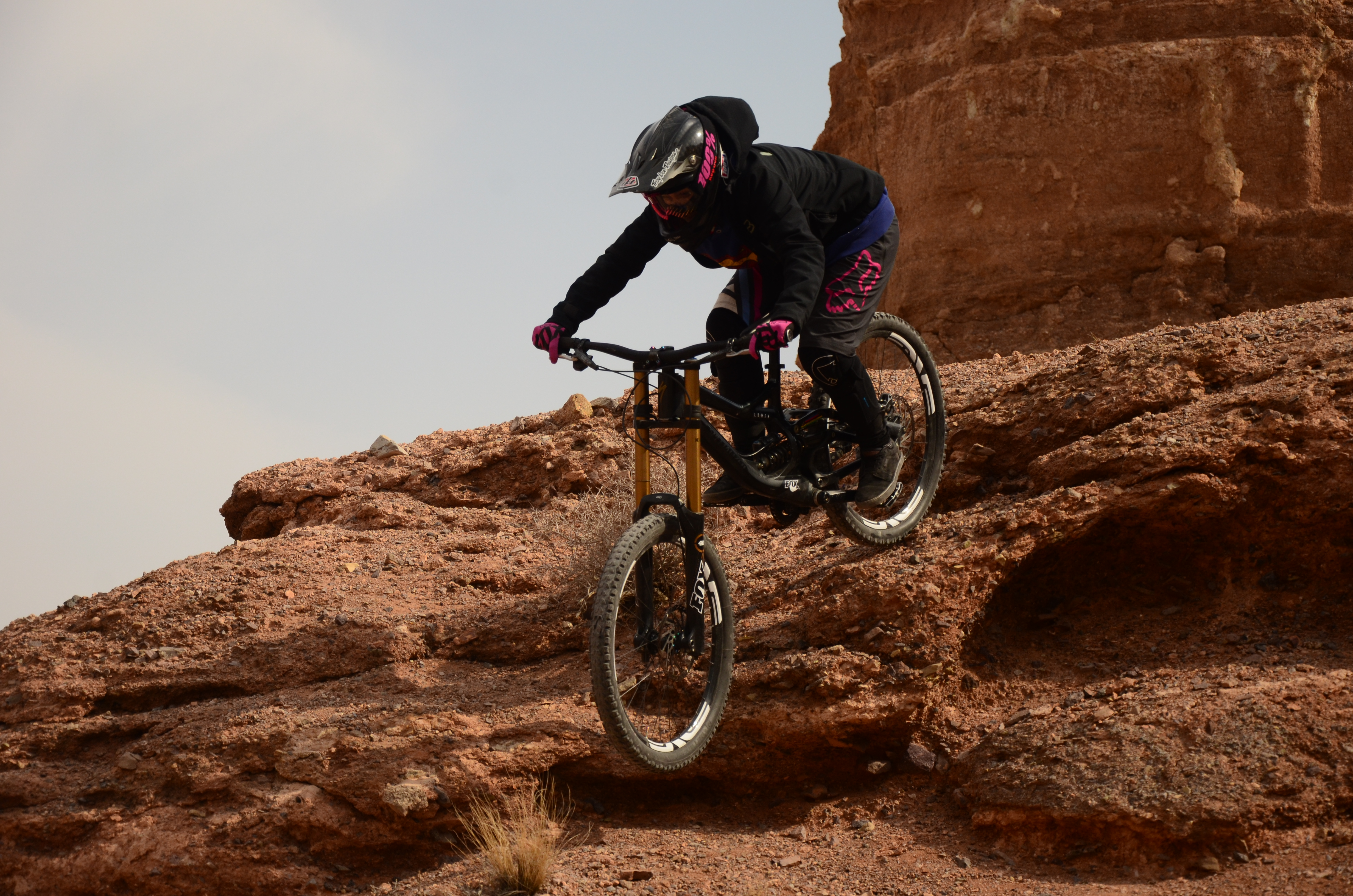 Charyn Canyon trail 2019, Kazkahstan